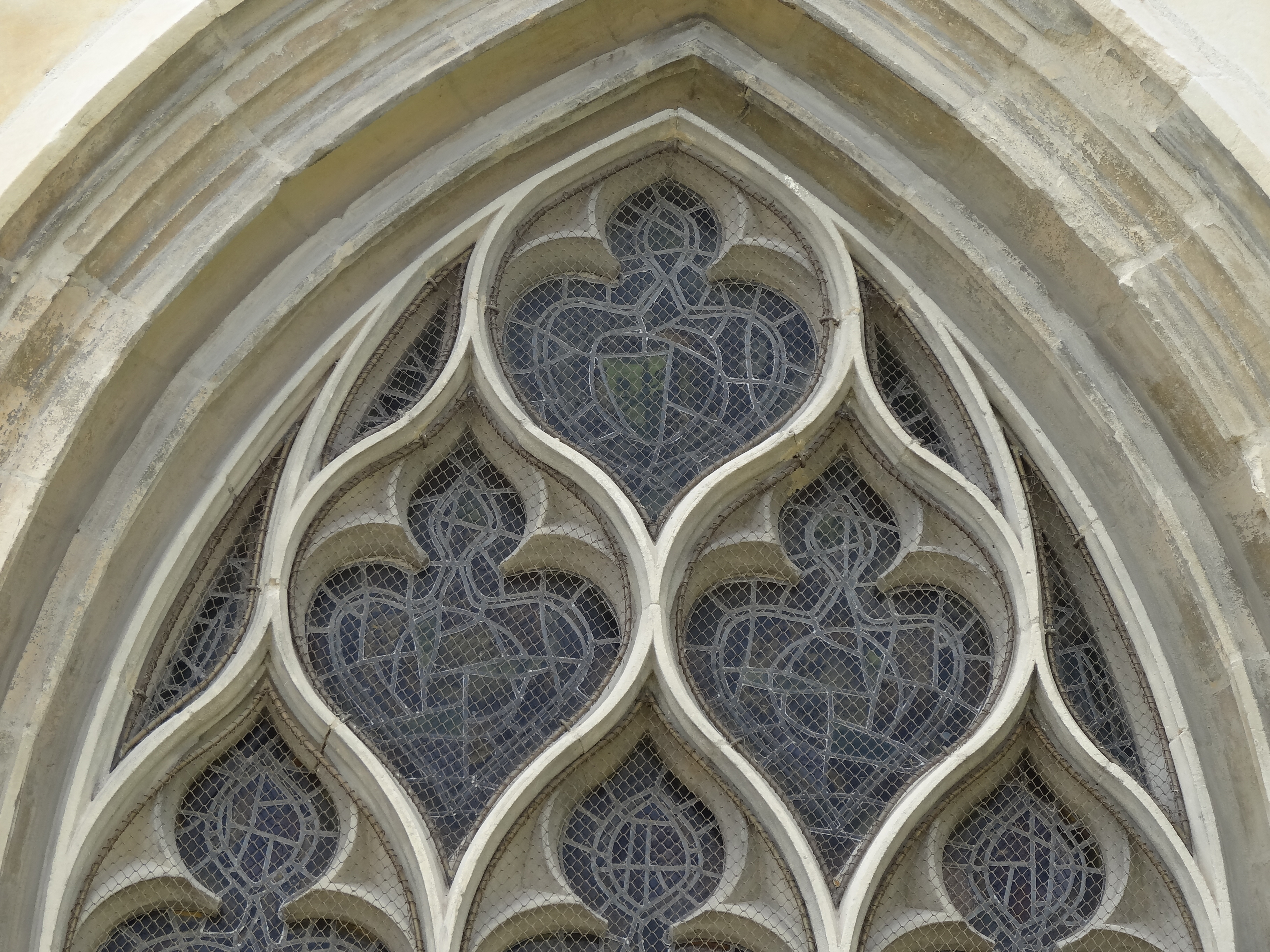 Caen, église St Georges du château Le réseau d'une des fenêtres du château est orné de trois soufflets au-dessus de trois lancettes trilobées